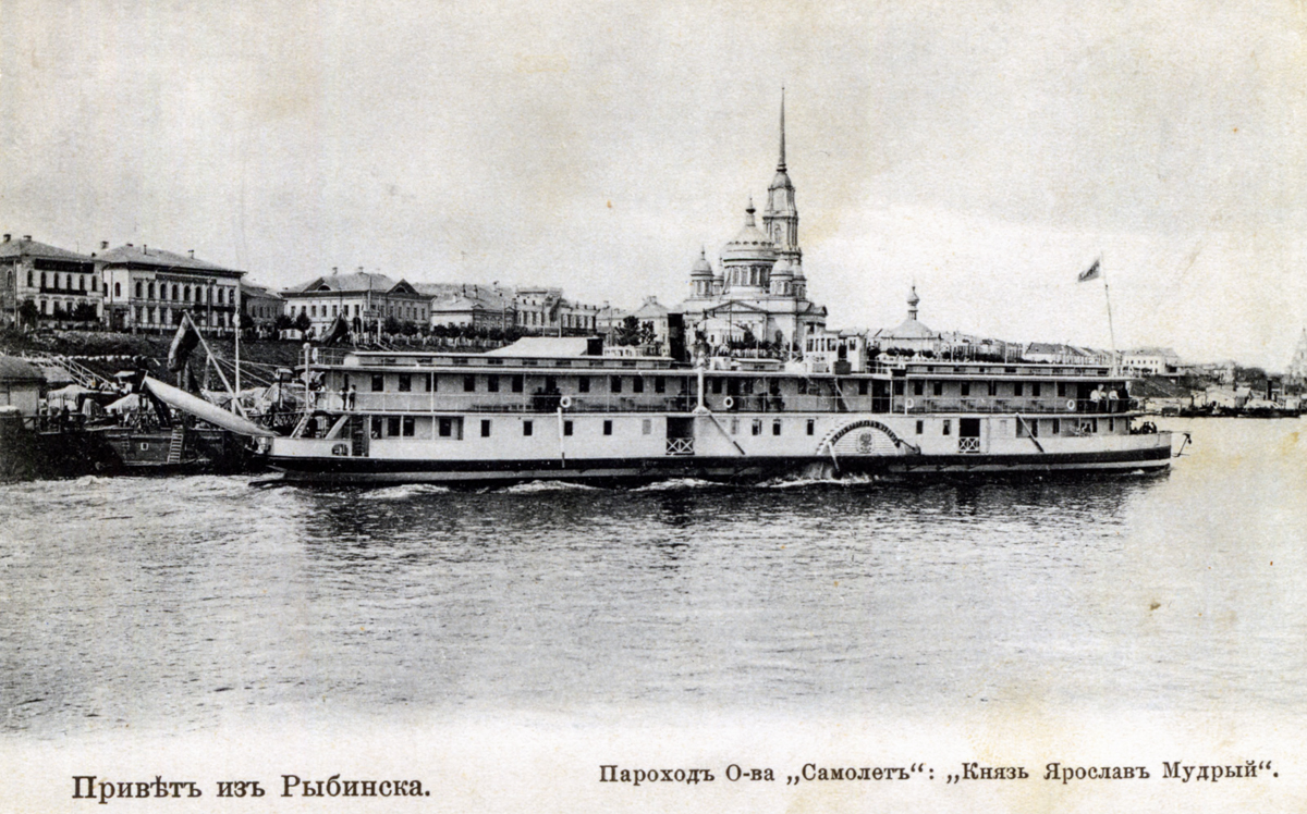 Пароход "Князь Ярослав Мудрый" общества "Самолет" в Рыбинске